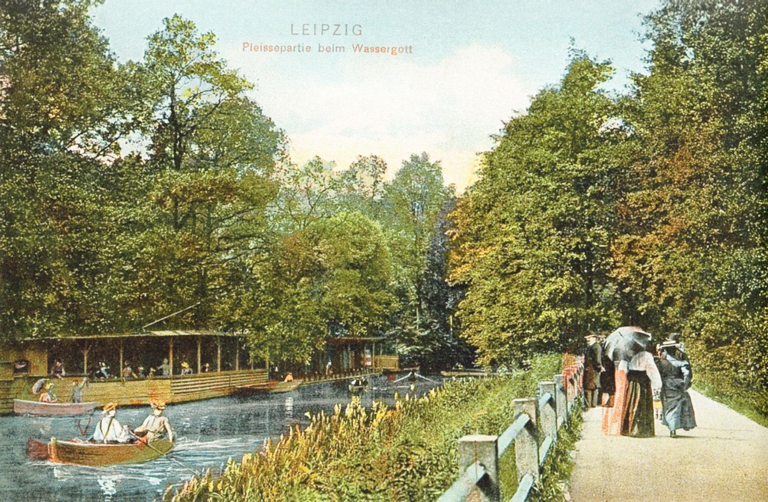 Das Restaurant Zum Wassergott an der Pleiße in Leipzig